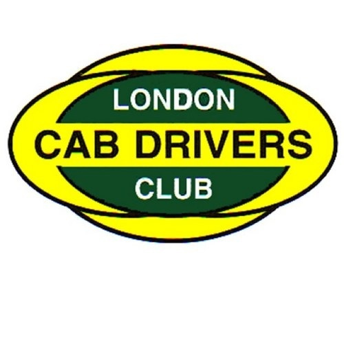 Clubs Logo